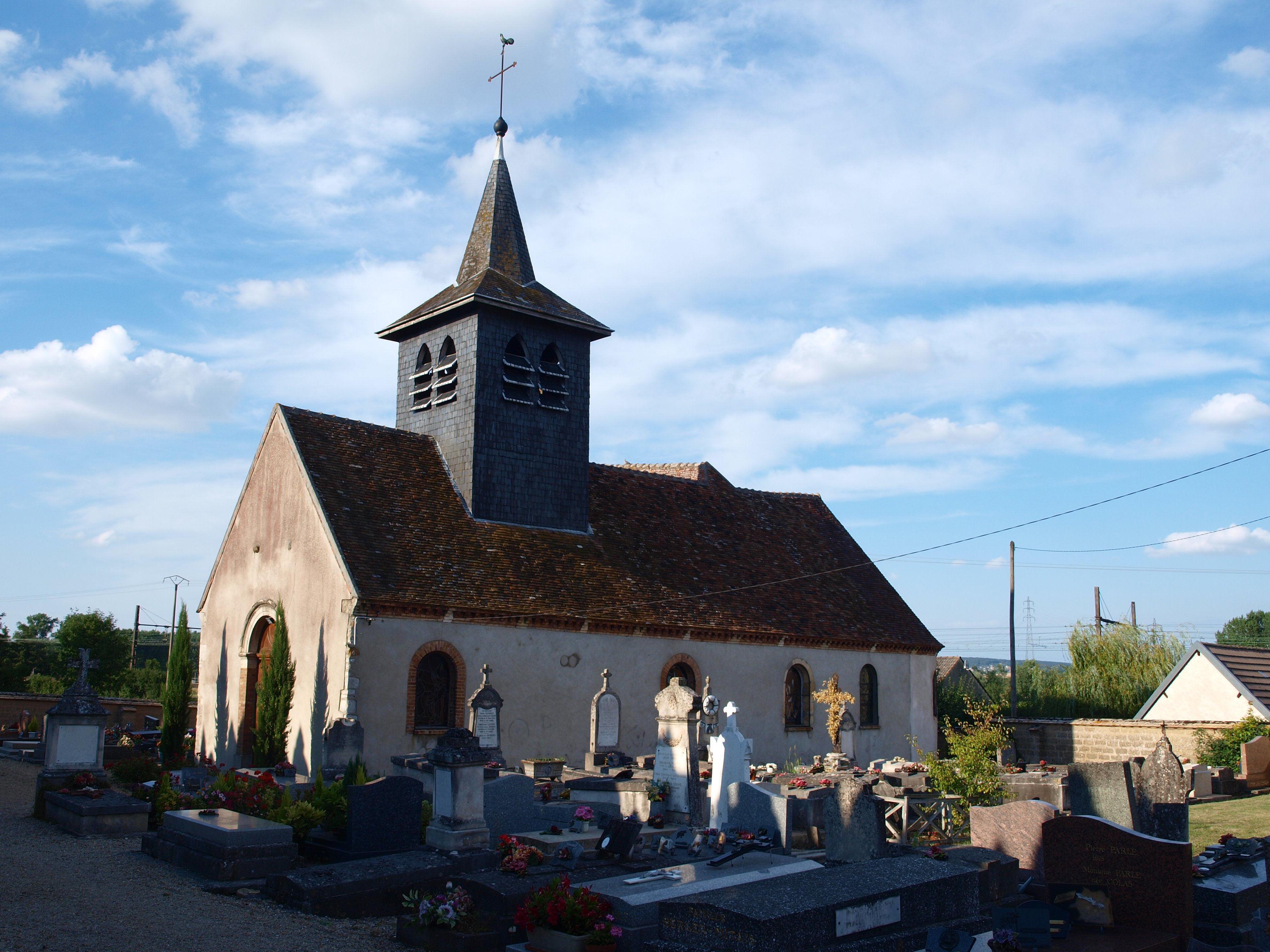 Courtois-sur-Yonne (Yonne, France) ; église